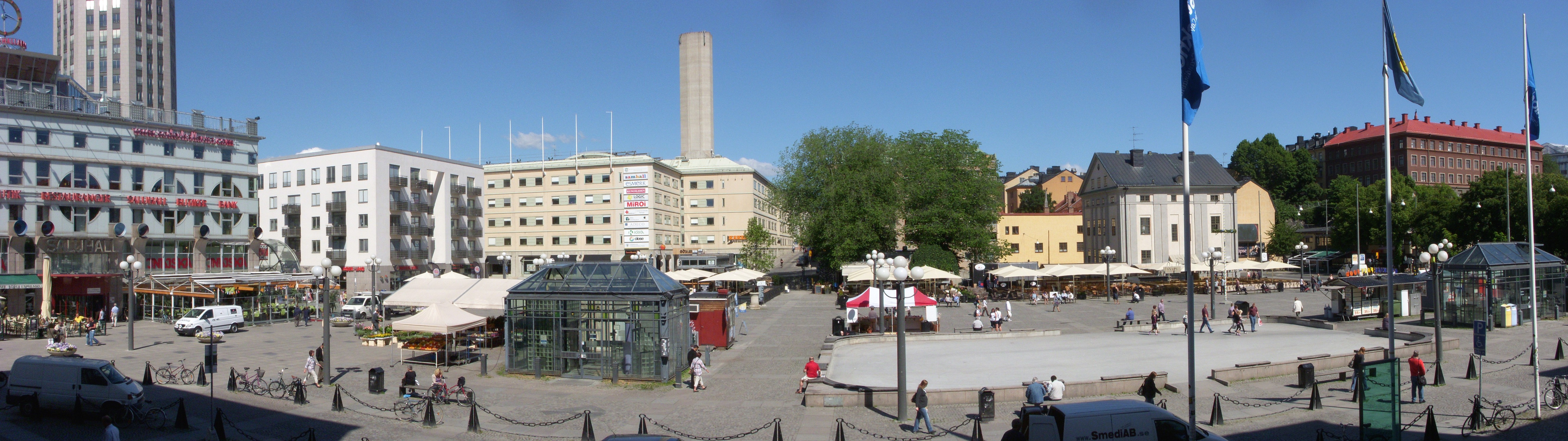 Medborgarplatsen i Stockholm, vy mot nord